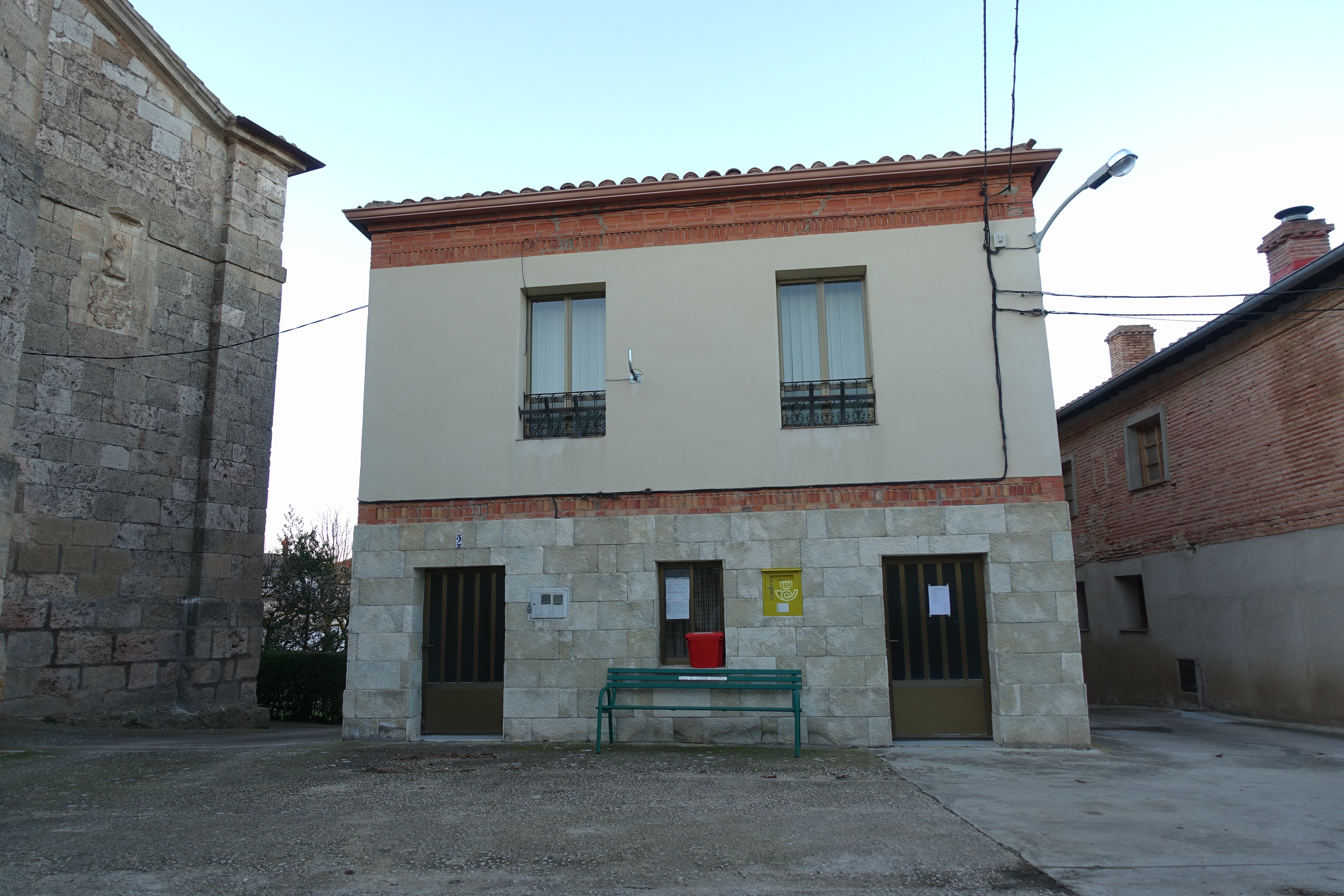 Casa consistorial de Fuentebureba (Burgos, España).